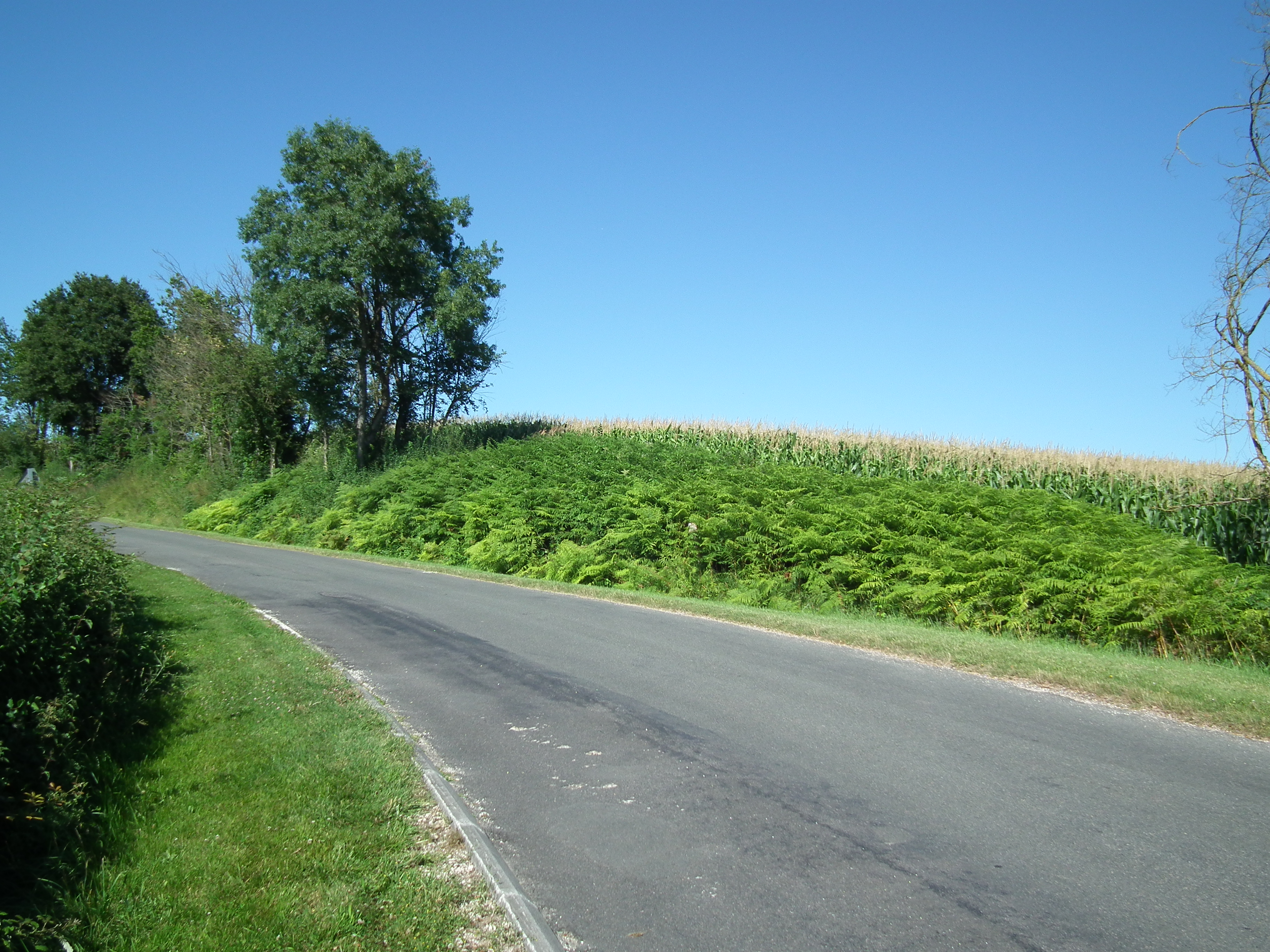 Paysage à Saint-Simon-de-Bordes